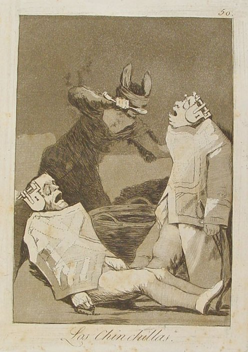 Capricho nº 50: Los Chinchillas de Goya, serie Los Caprichos